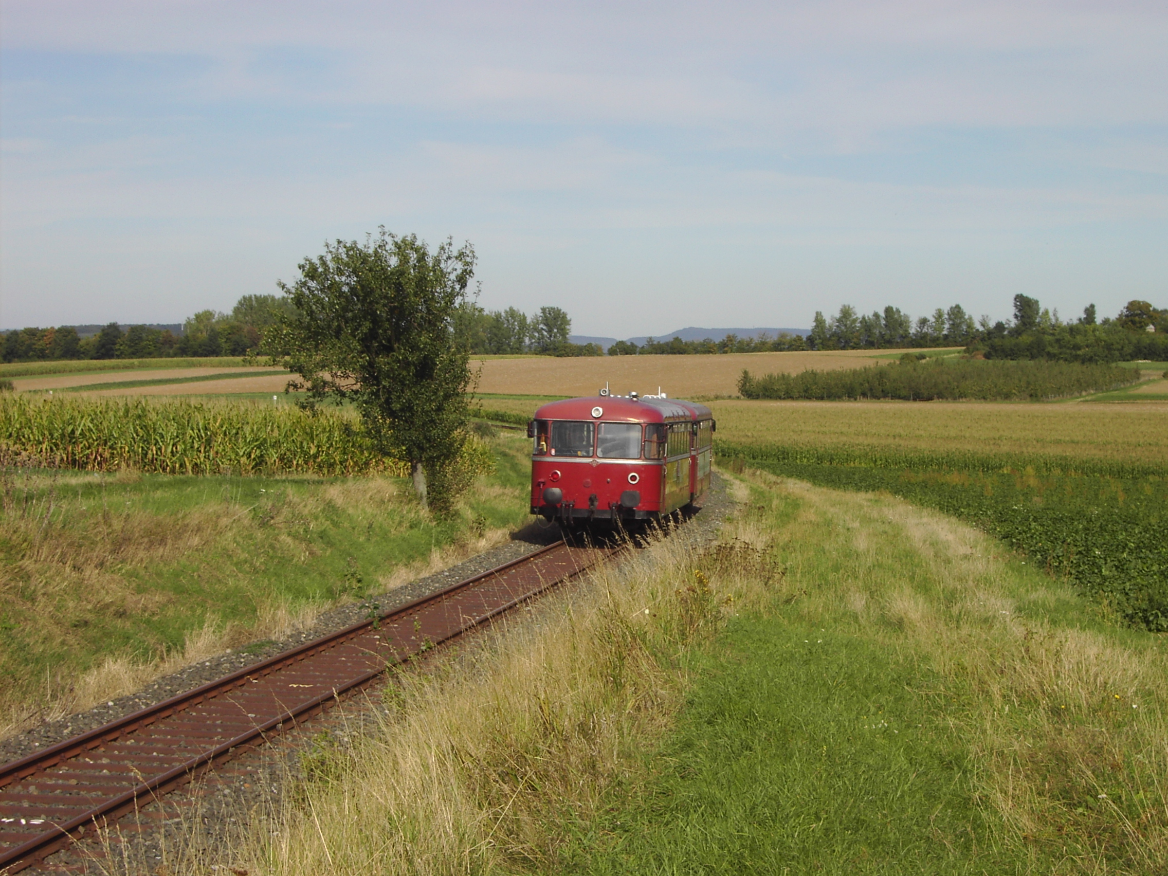 Eine zweiteilige Schienenbus-Garnitur auf der Mainschleifenbahn zwischen Prosselsheim und Escherndorf